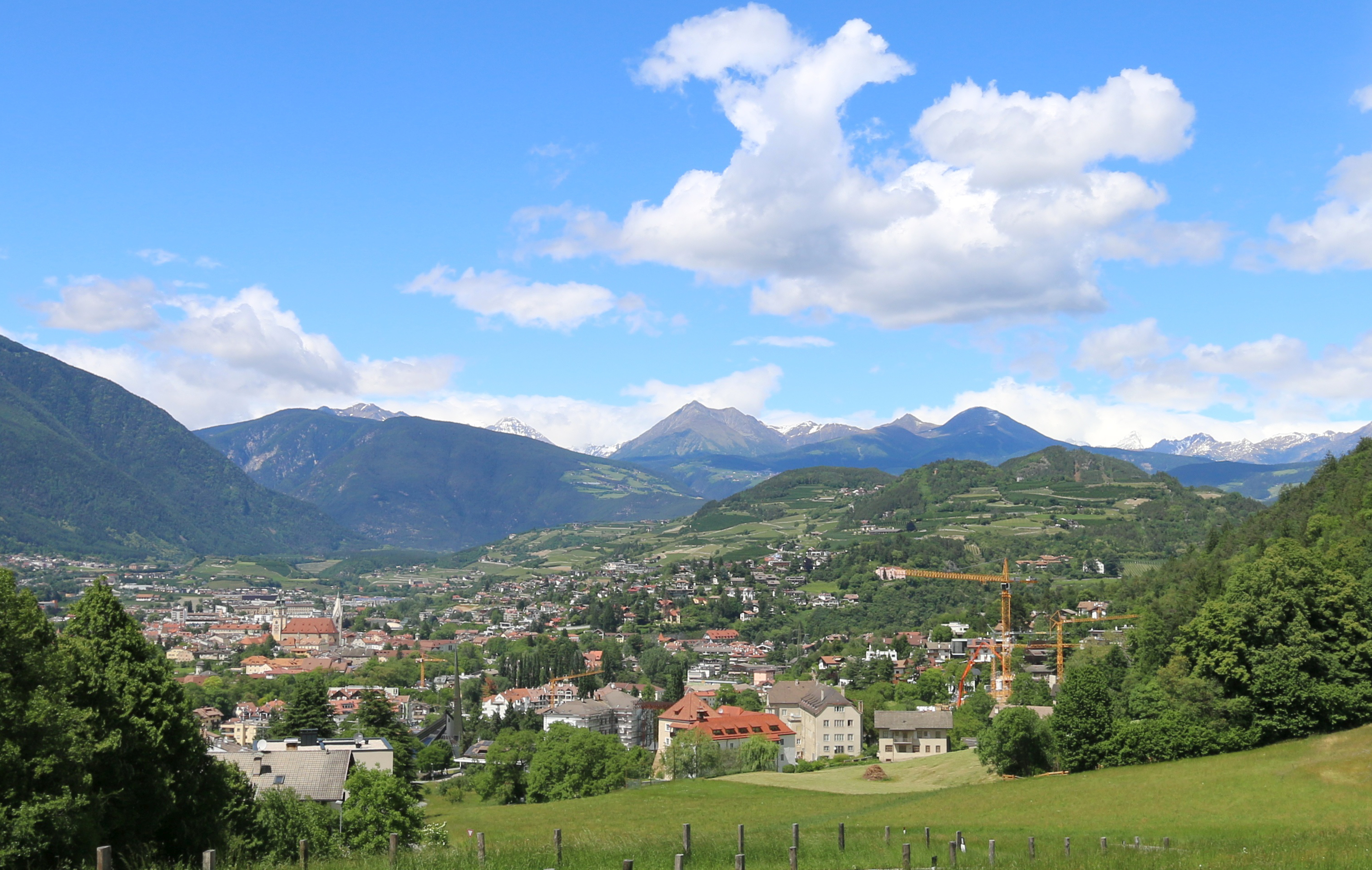 Brixen, Südtirol: Blick von der Kirche Maria im Sand